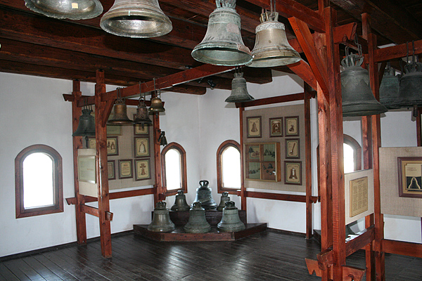 Виставка дзвонів у Луцькому замку